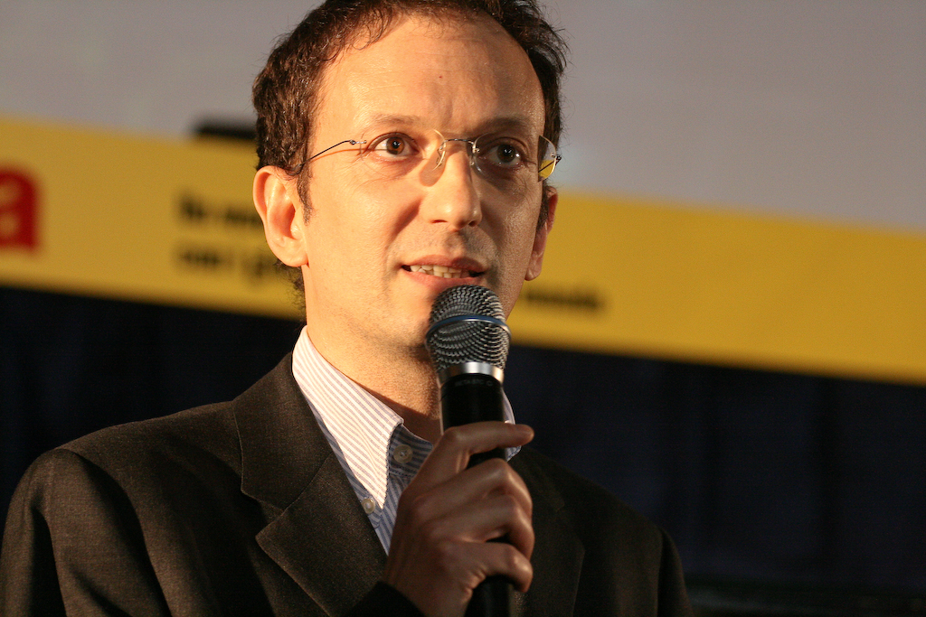 Cronaca dell'intervento di Amira Hass